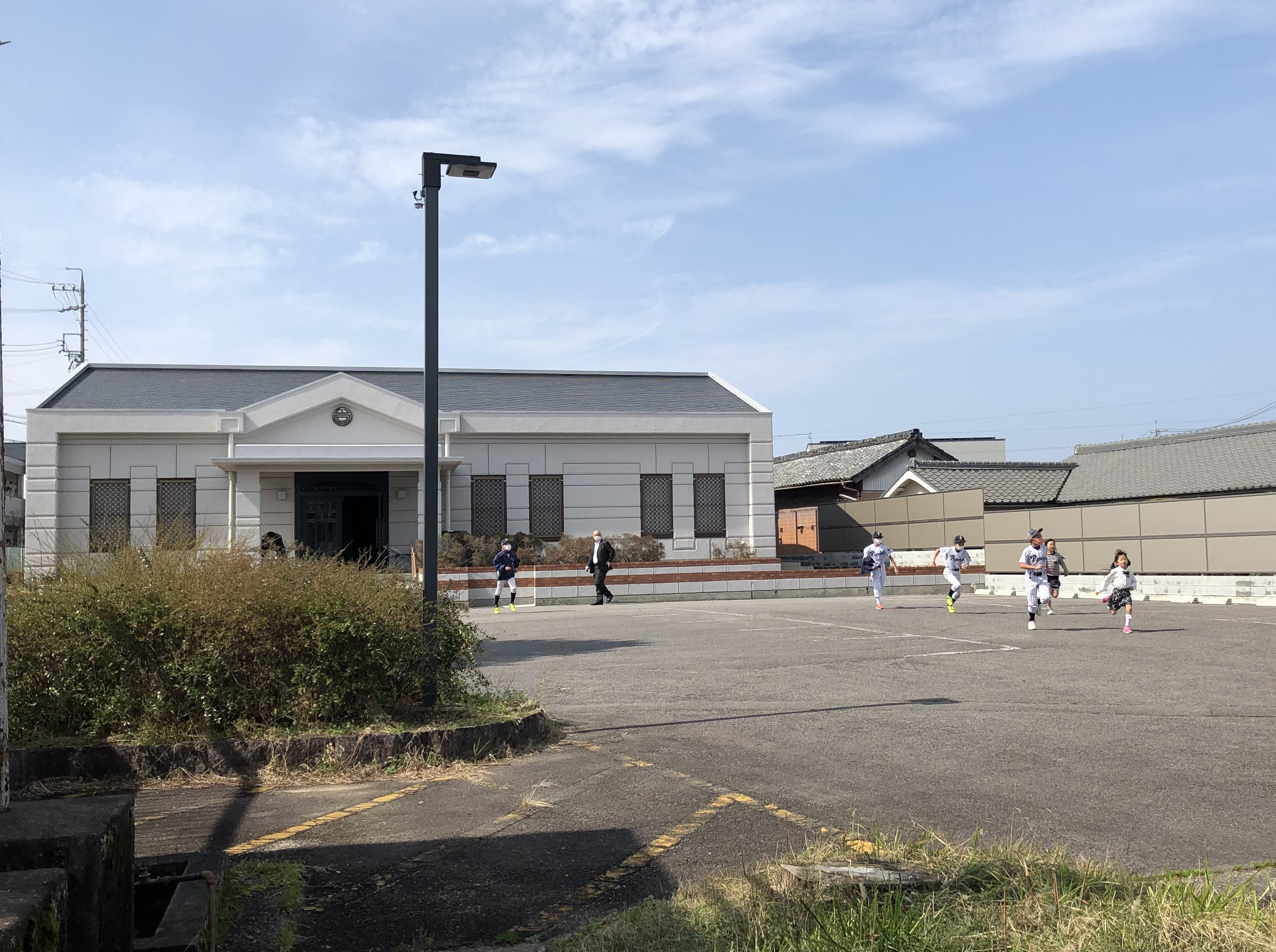 岩津学区市民ホーム（岡崎市岩津町）